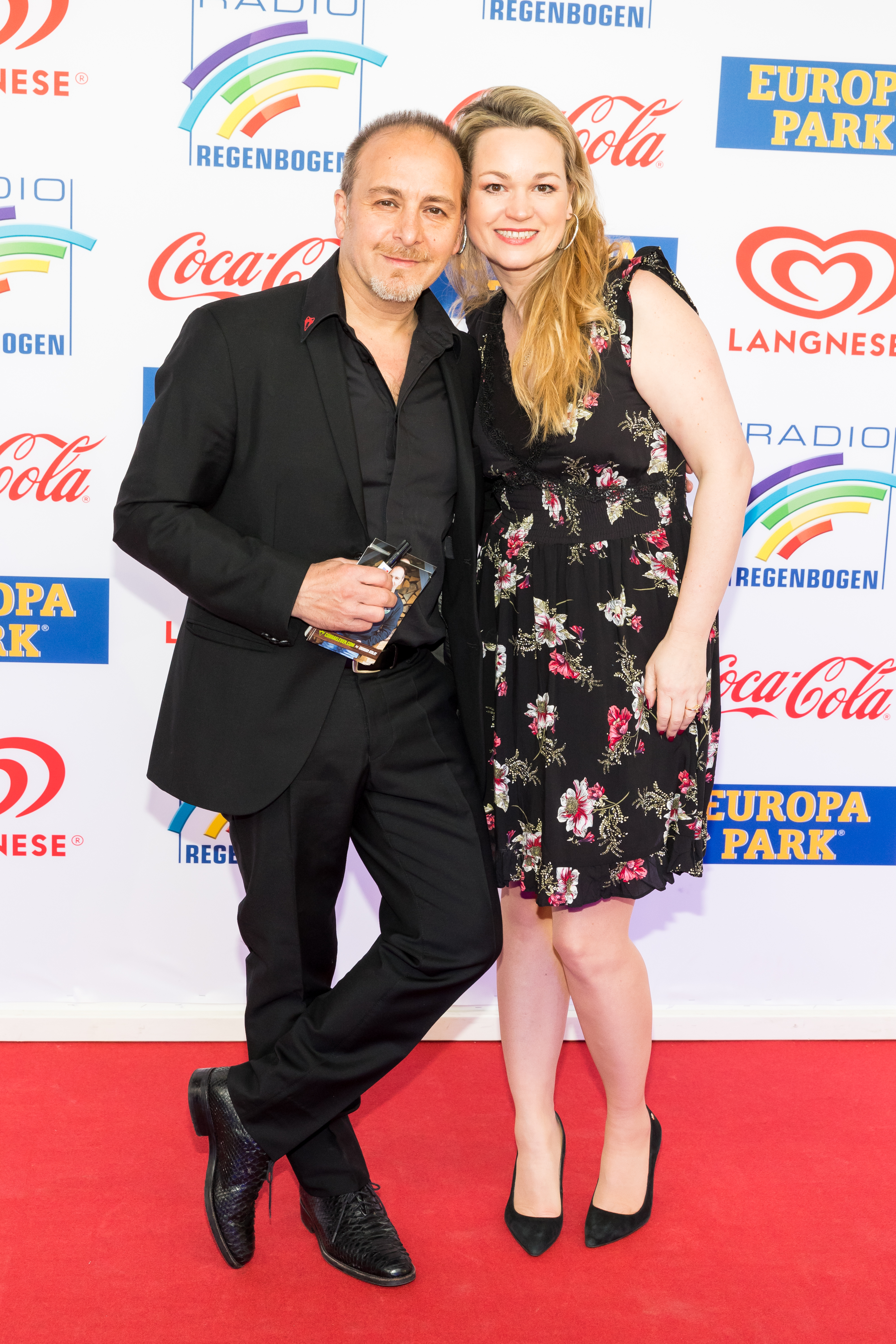 Erdoğan Atalay during Radio Regenbogen Award 2019 at Europapark, Rust, Baden-Württemberg, Germany on 2019-04-12, Photo: Sven Mandel